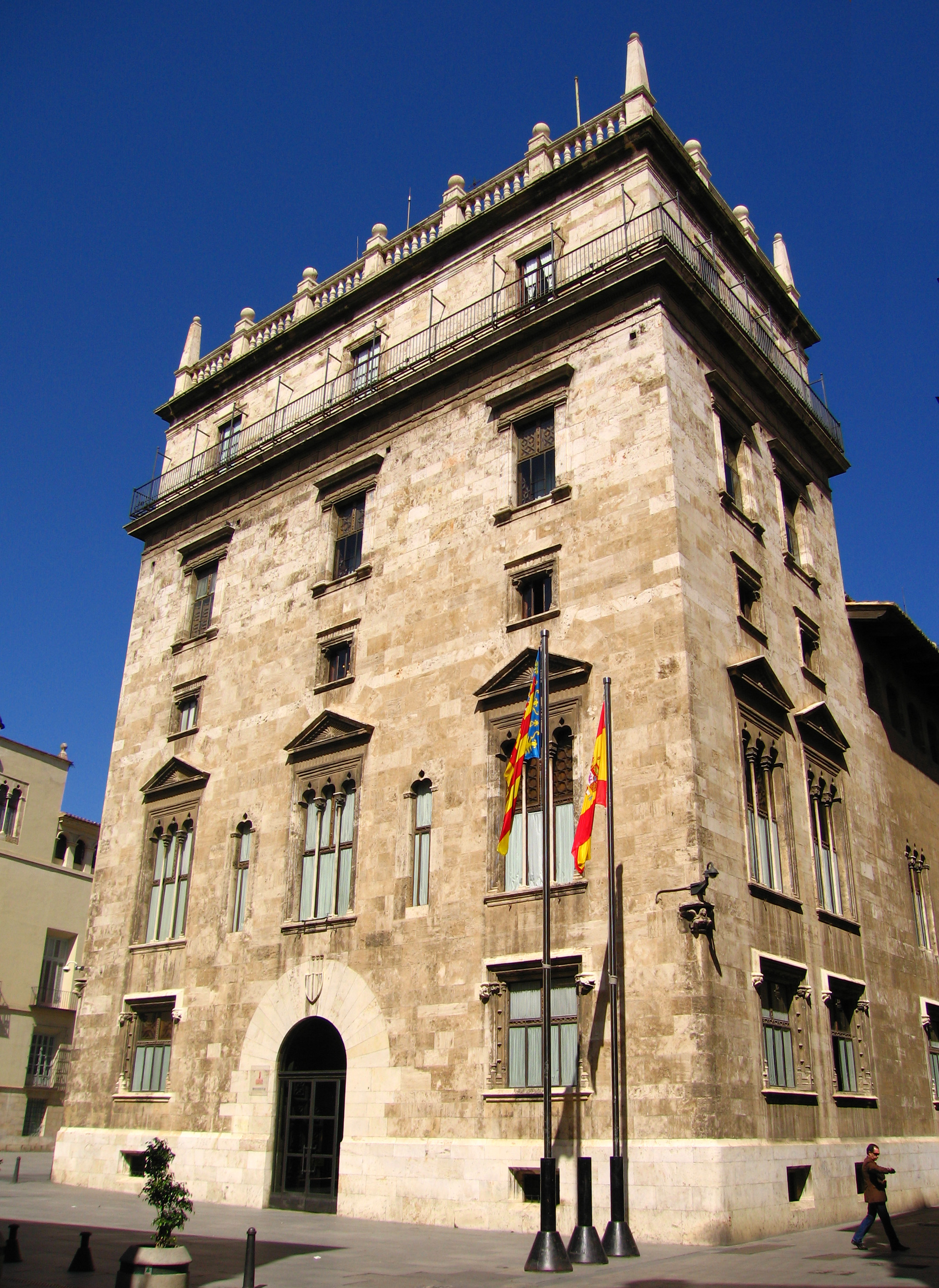 Palau Generalitat València